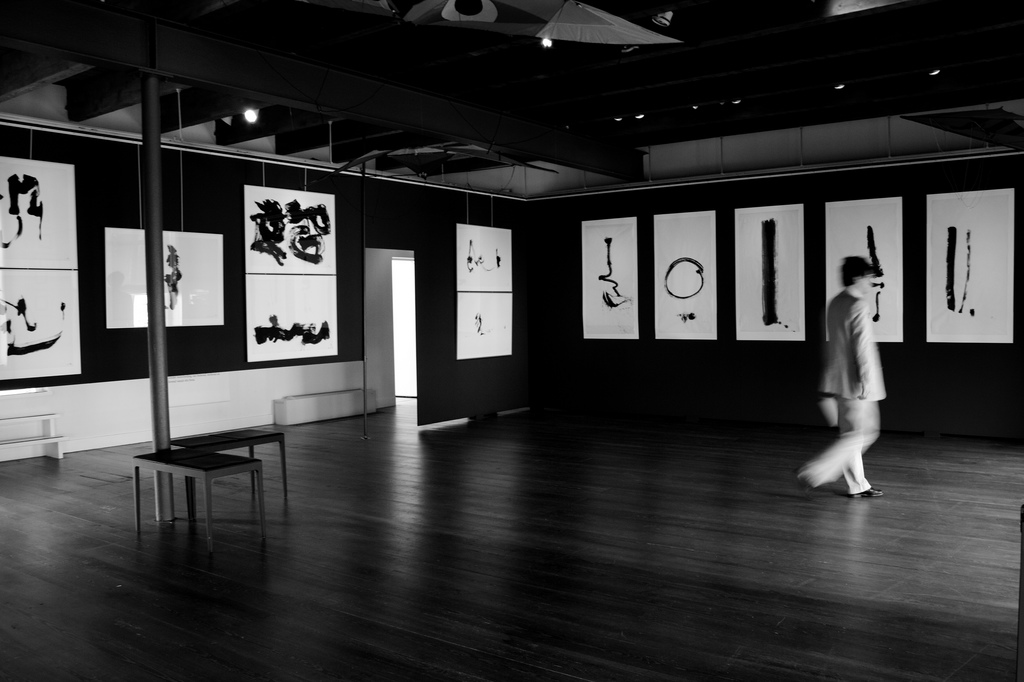 De Leidse kunstenaar Kees Buurman (1933-1997) vond in de Japanse cultuur elementen terug waarmee hij zich al jarenlang had beziggehouden: de leegte, de essentie van zwart en wit, het immateriële, de verbondenheid van kunst en religie.